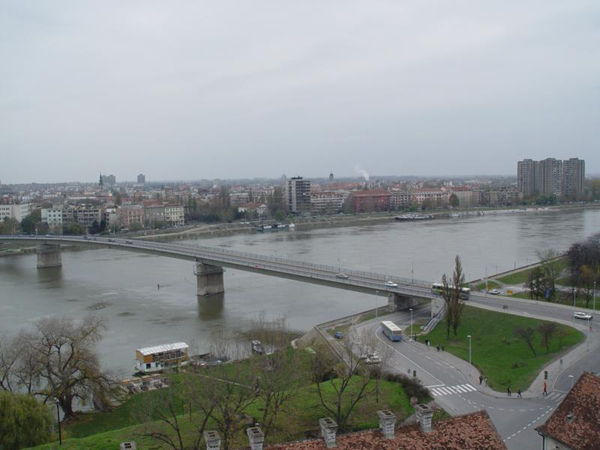 слика Новог Сада